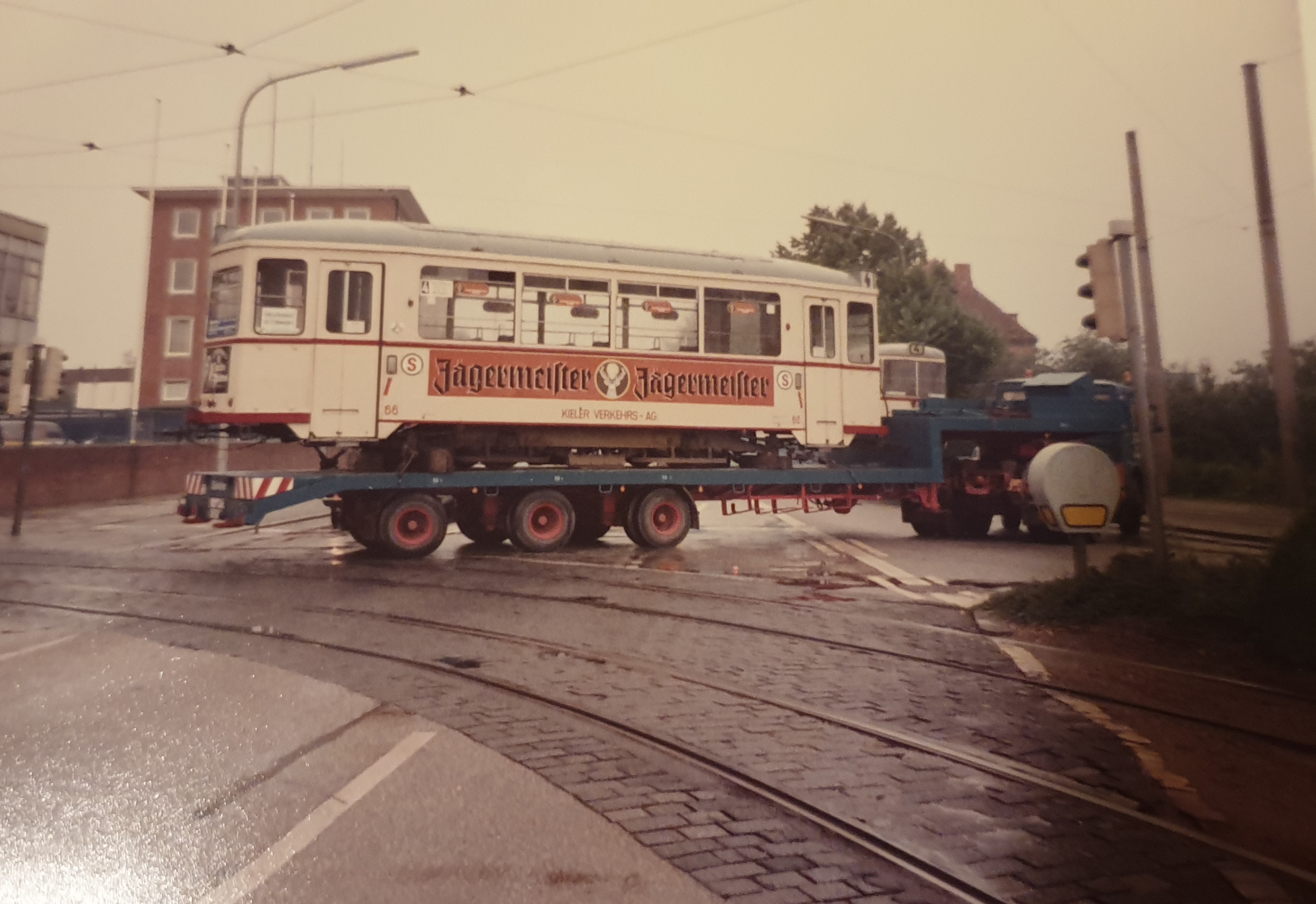 KVAG, Straßenbahn, Kiel, Abbau, Rückbau